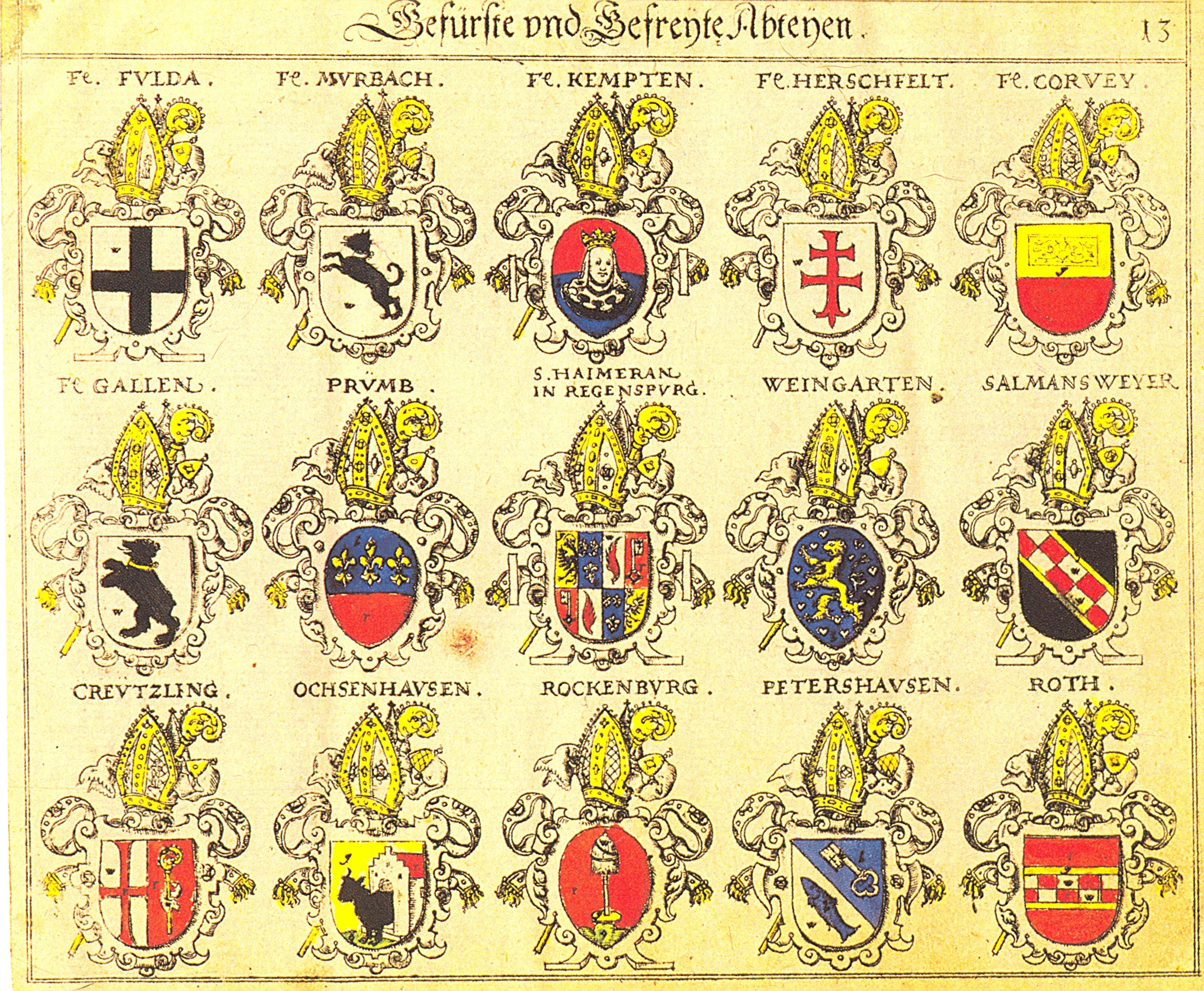 Johann Siebmacher: New Wappenbuch eingescannt aus: Horst Appuhn (Hrsg.), Johann Siebmachers Wappenbuch. Die bibliophilen Taschenbücher 538, 2. verb. Aufl , Dortmund 1989 Blatt 13